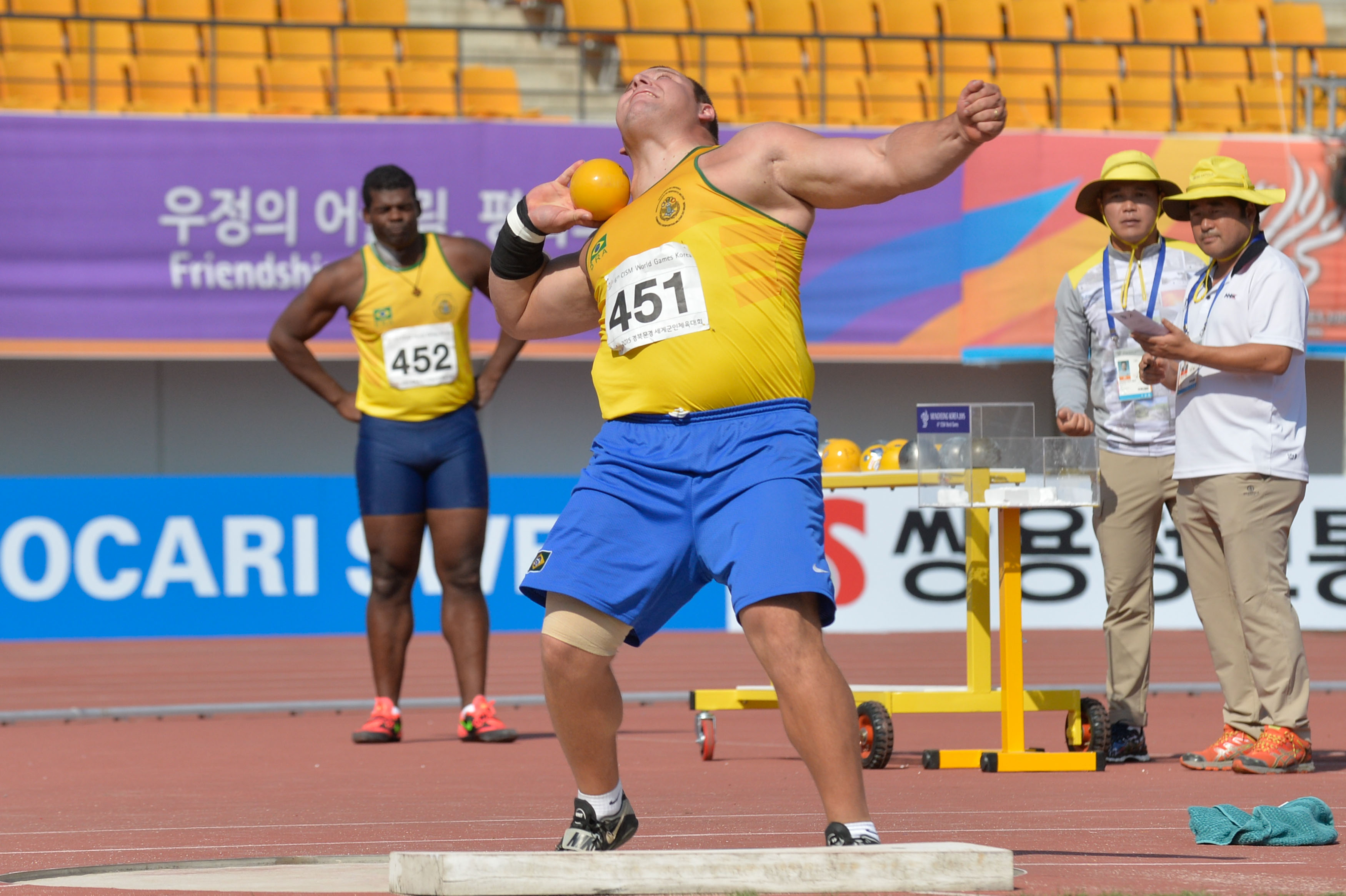 Darlan Romani ganha medalha de ouro nos 6º Jogos Mundiais Militares. Foto: Felipe Barra